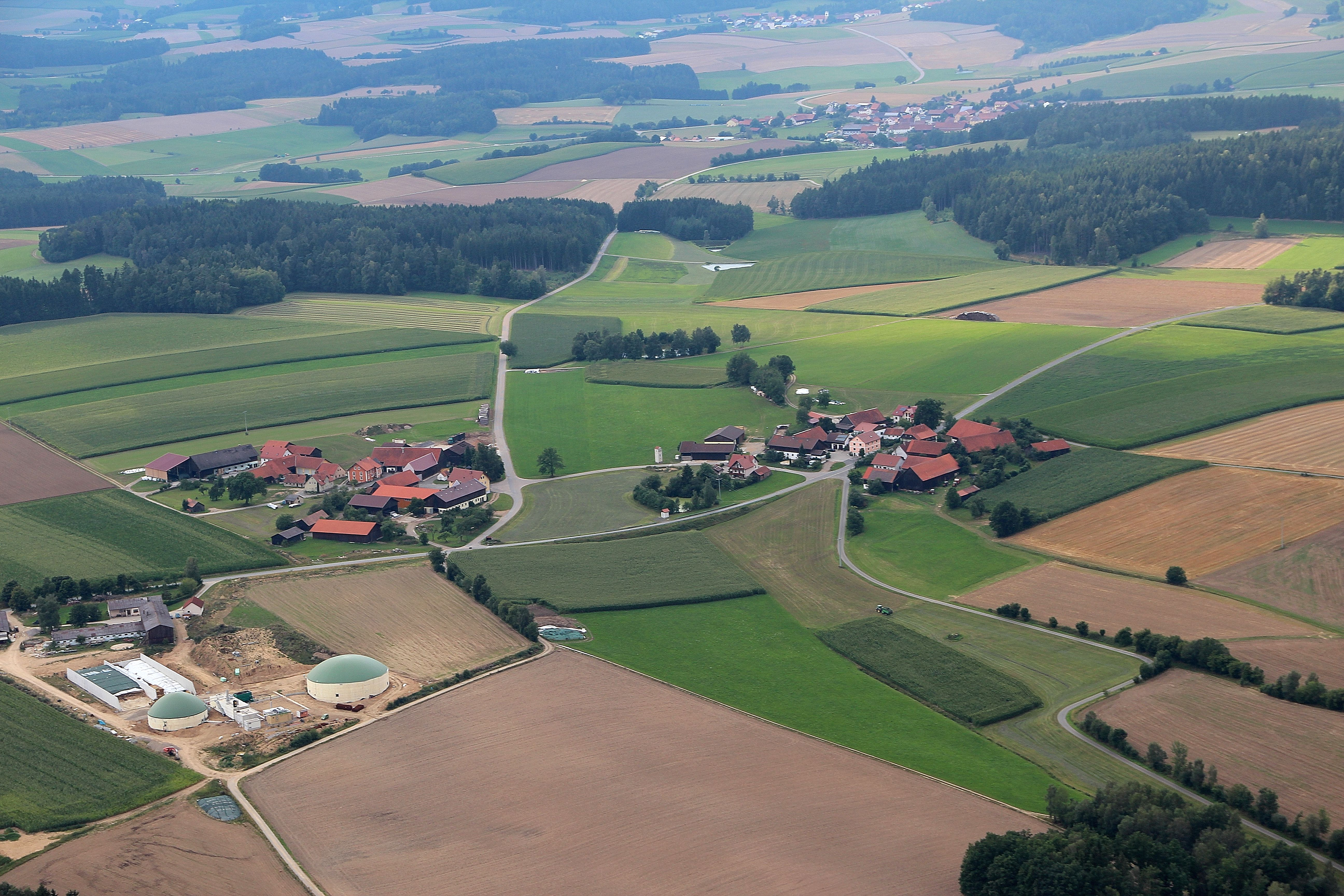 Enzelsberg (Gemeinde Niedermurach, Landkreis Schwandorf, Oberpfalz, Bayern), im Hintergrund am oberen Bildrand Pischdorf und Weidenthal(ganz oben)